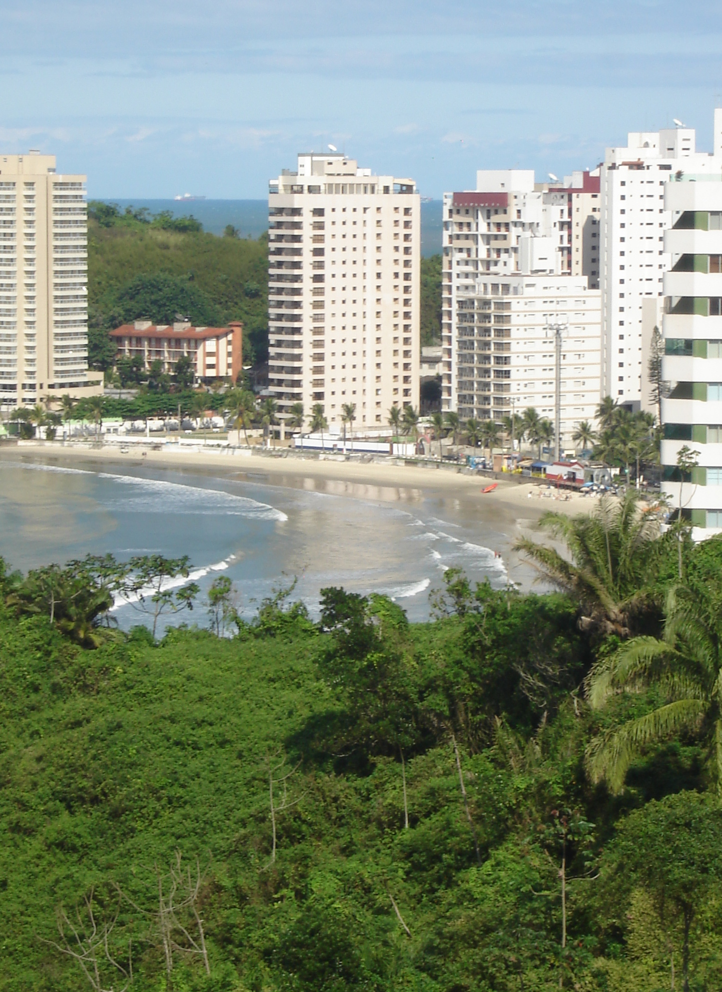 Praia das Astúrias, Guarujá, São Paulo